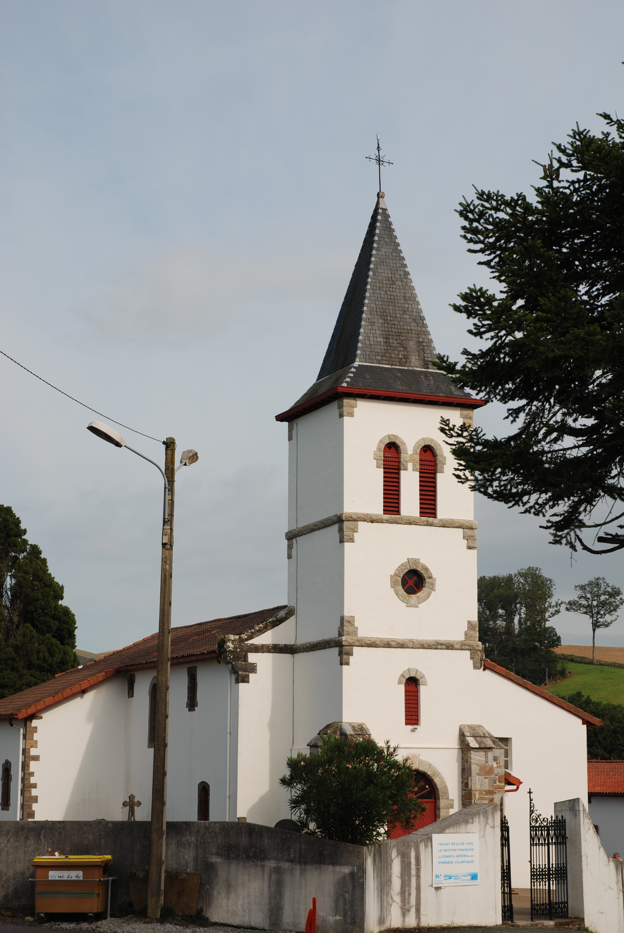 Méharin, l'église Saint-Laurent